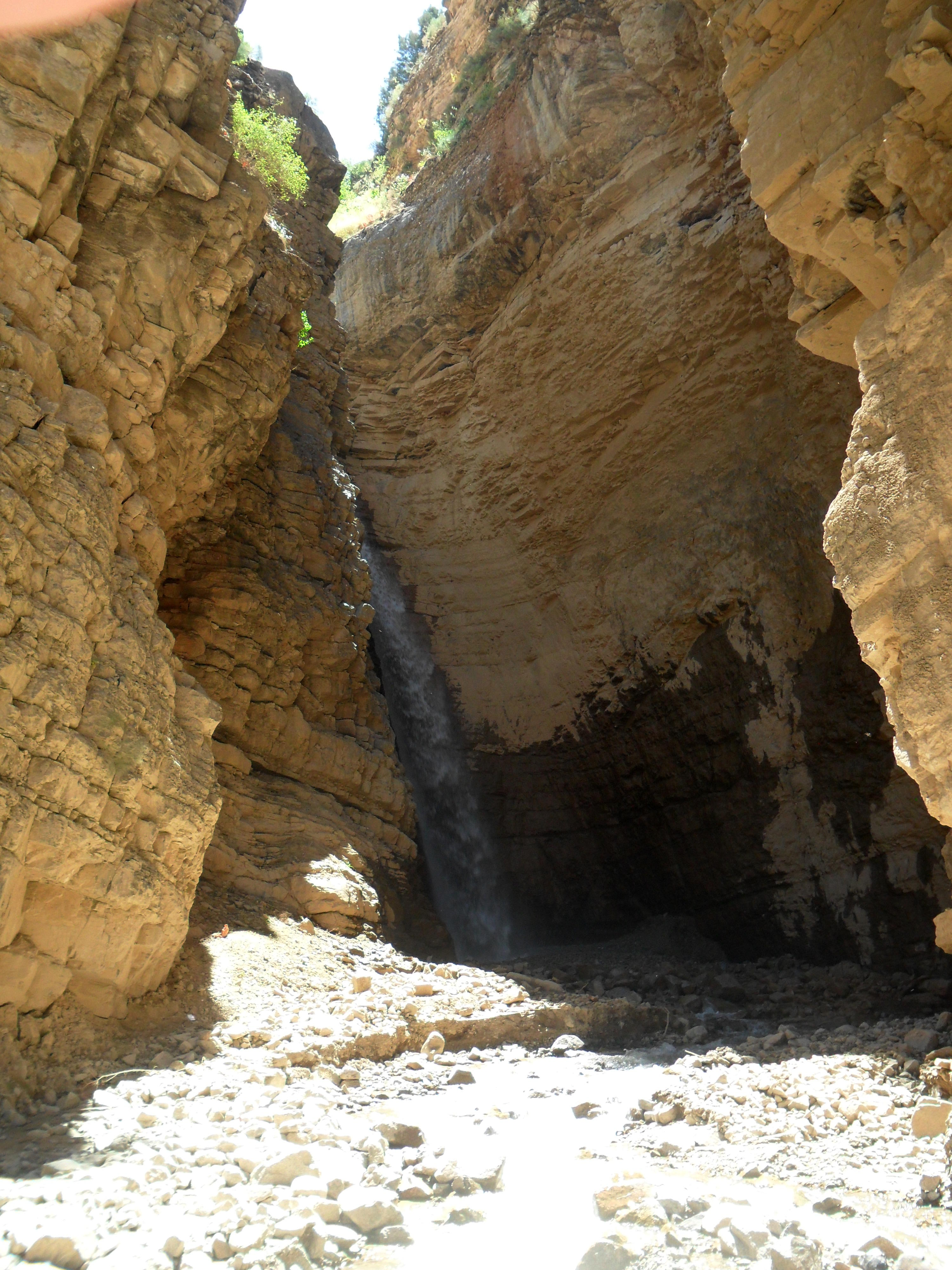 Водопад на реке Пальтау.